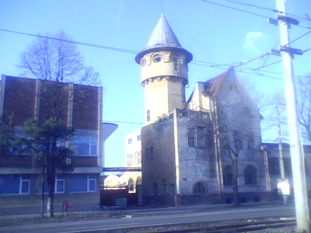 Fostă clădire administrativă a Fabricii "Astra" din Arad . (Din 1915 până în 1918 aici s-au fabricat numai motoare de avion).